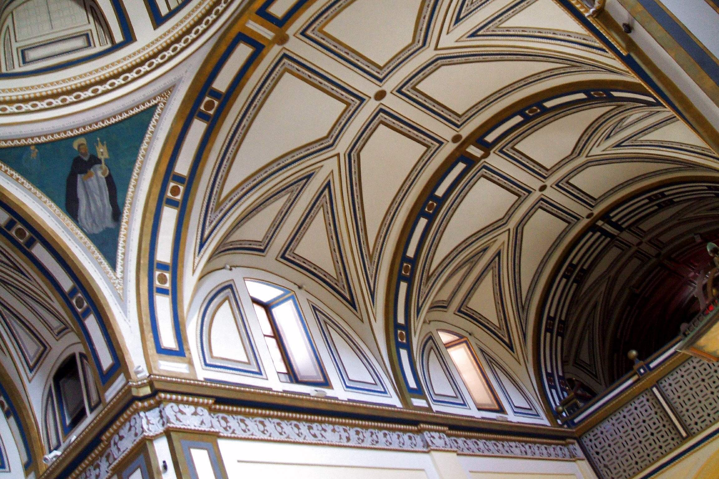 Convento de Porta Coeli (MM Dominicas), en Valladolid